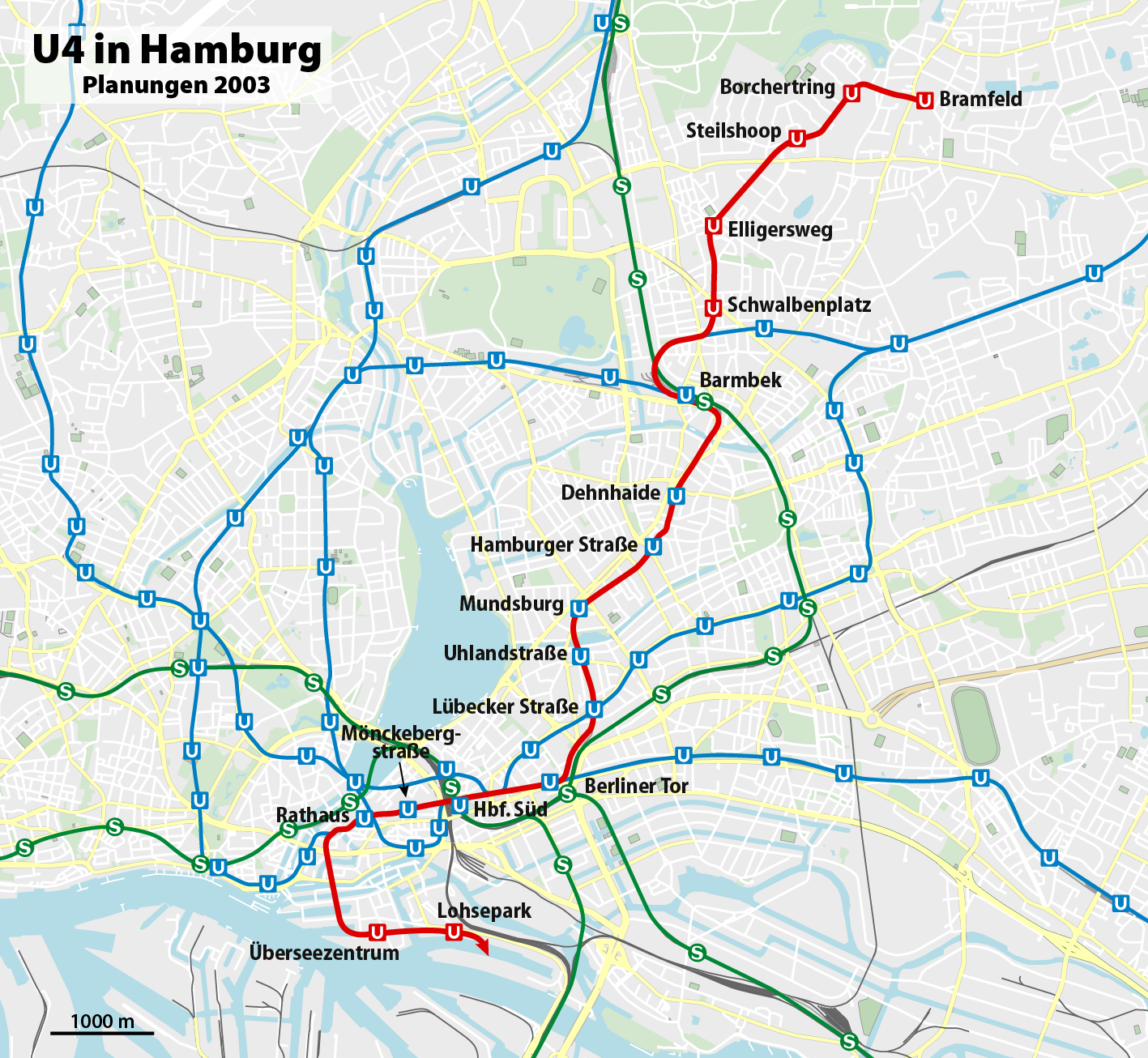 Planungsstand 2003 zur U-Bahn-Linie 4 in Hamburg This map may be incomplete, and may contain errors. Don't rely solely on it for navigation.